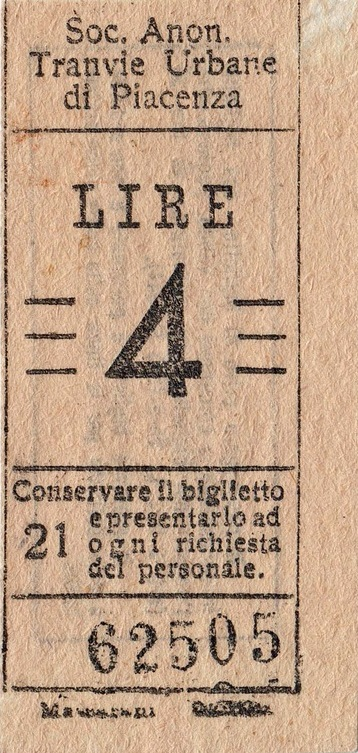 Piacenza, biglietto tram